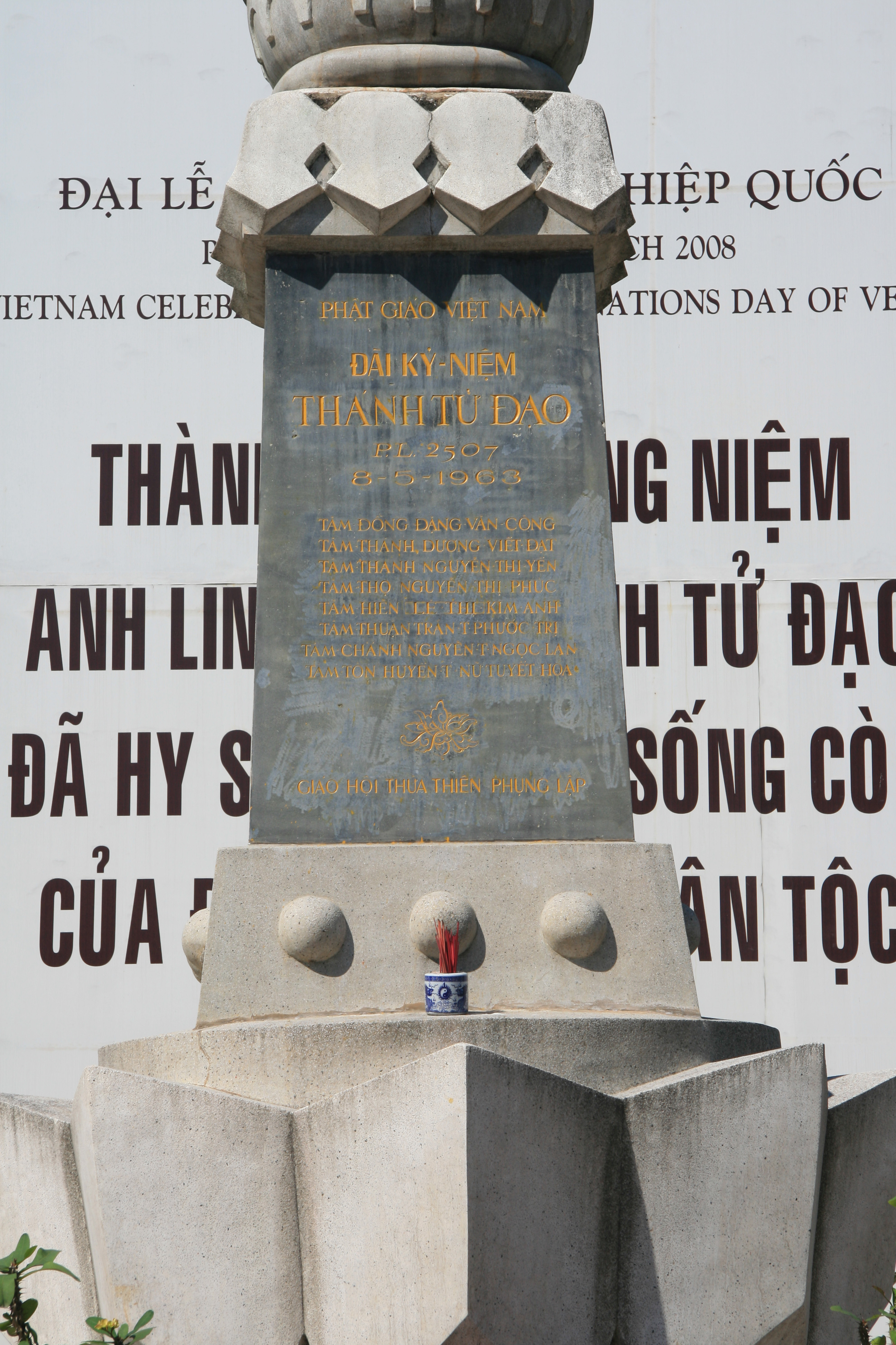 Đài kỉ niệm thánh tử đạo, sự kiện 1963 tại Huế, Việt Nam. Danh sách 8 nạn nhân chết ngày 8-5-1963.